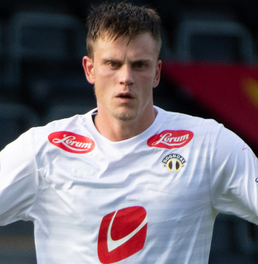 Kristoffer Hoven. Frå kampen mellom Sogndal og Raufoss 31. juli 2020.